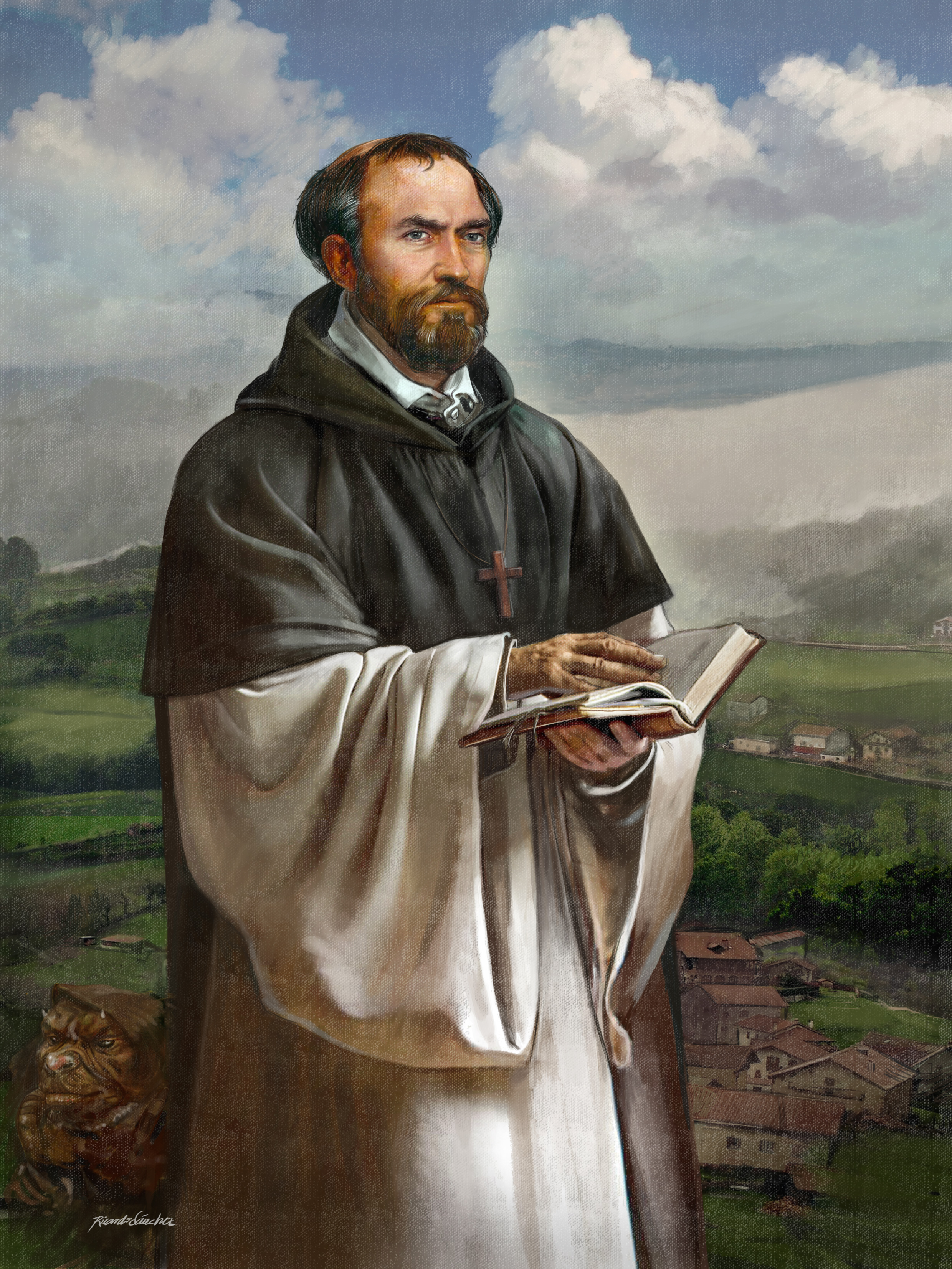 Ilustración de Alonso de Salazar, realizada por Ricardo Sánchez «Risconegro Creatividad», publicada por primera vez en la revista «La Aventura de la Historia»